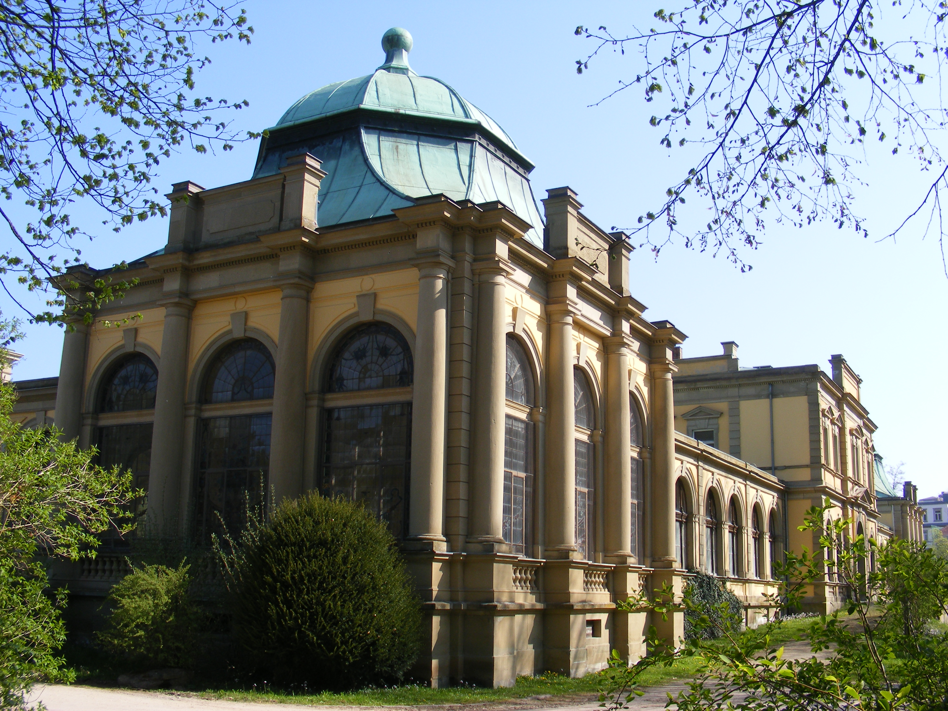 Bad Kissingen - Luitpold-Bad südwestlich (Außenansicht).